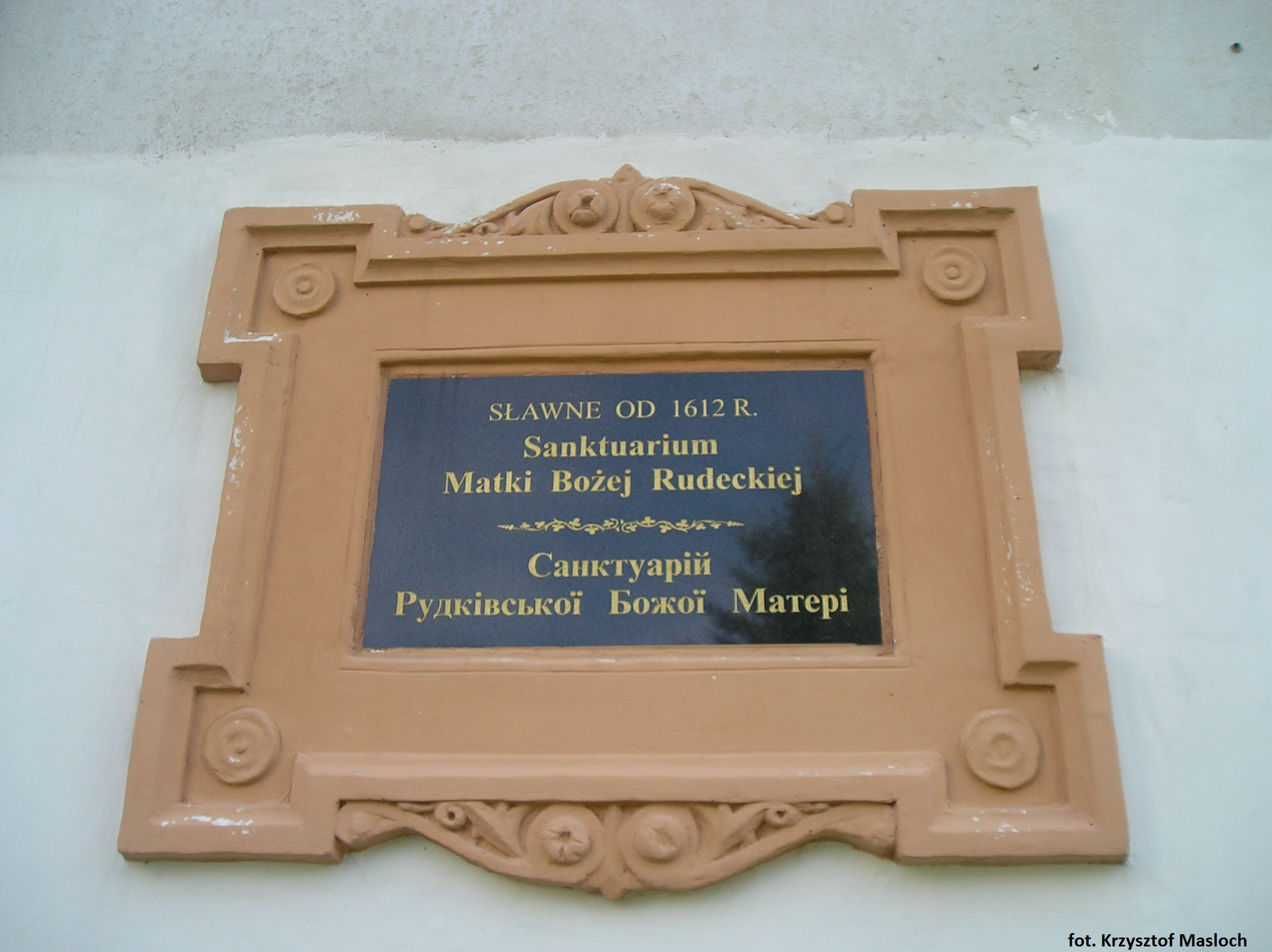 Sanktuarium Matki Bożej Rudeckiej tablica